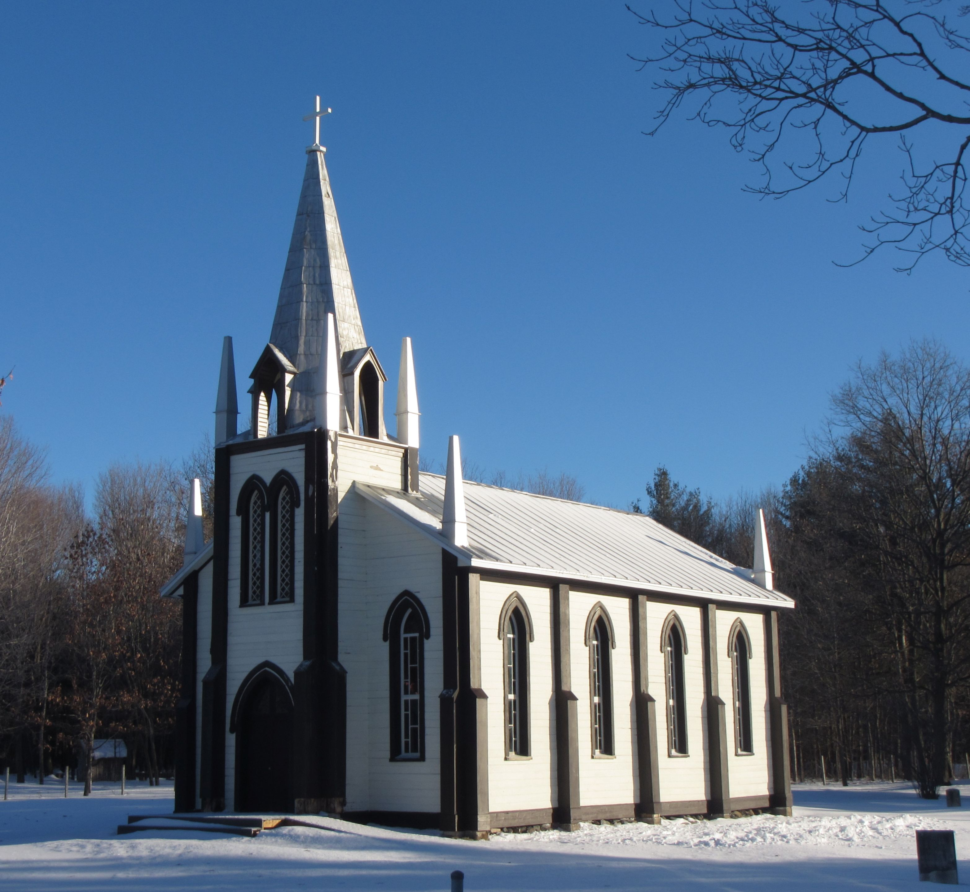 Église Saint-Paul-de-Sydenham Place à Saint-Félix-de-Kingsey, Québec